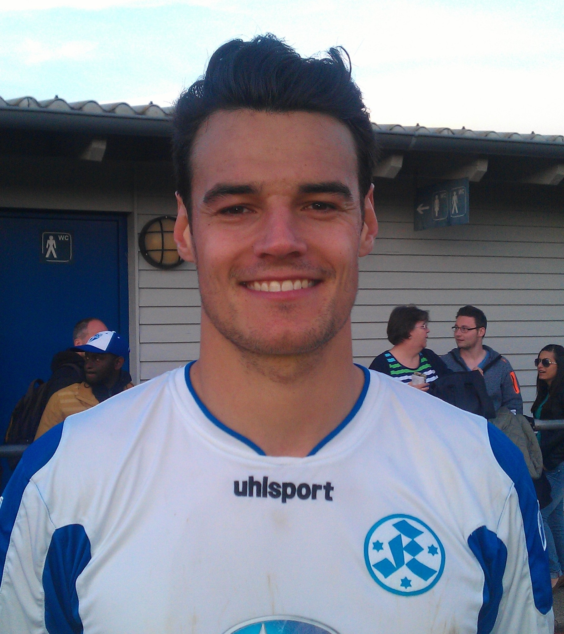 Julian Leist 2014 im Trikot der Stuttgarter Kickers